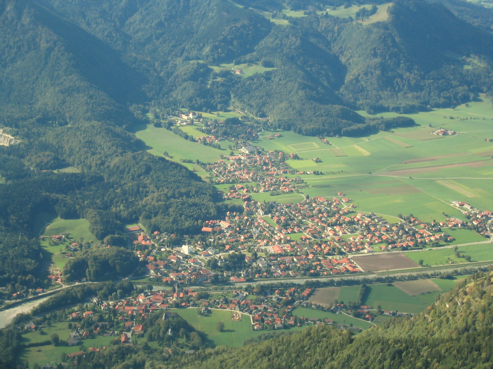 Marquartstein from Schnappenberg